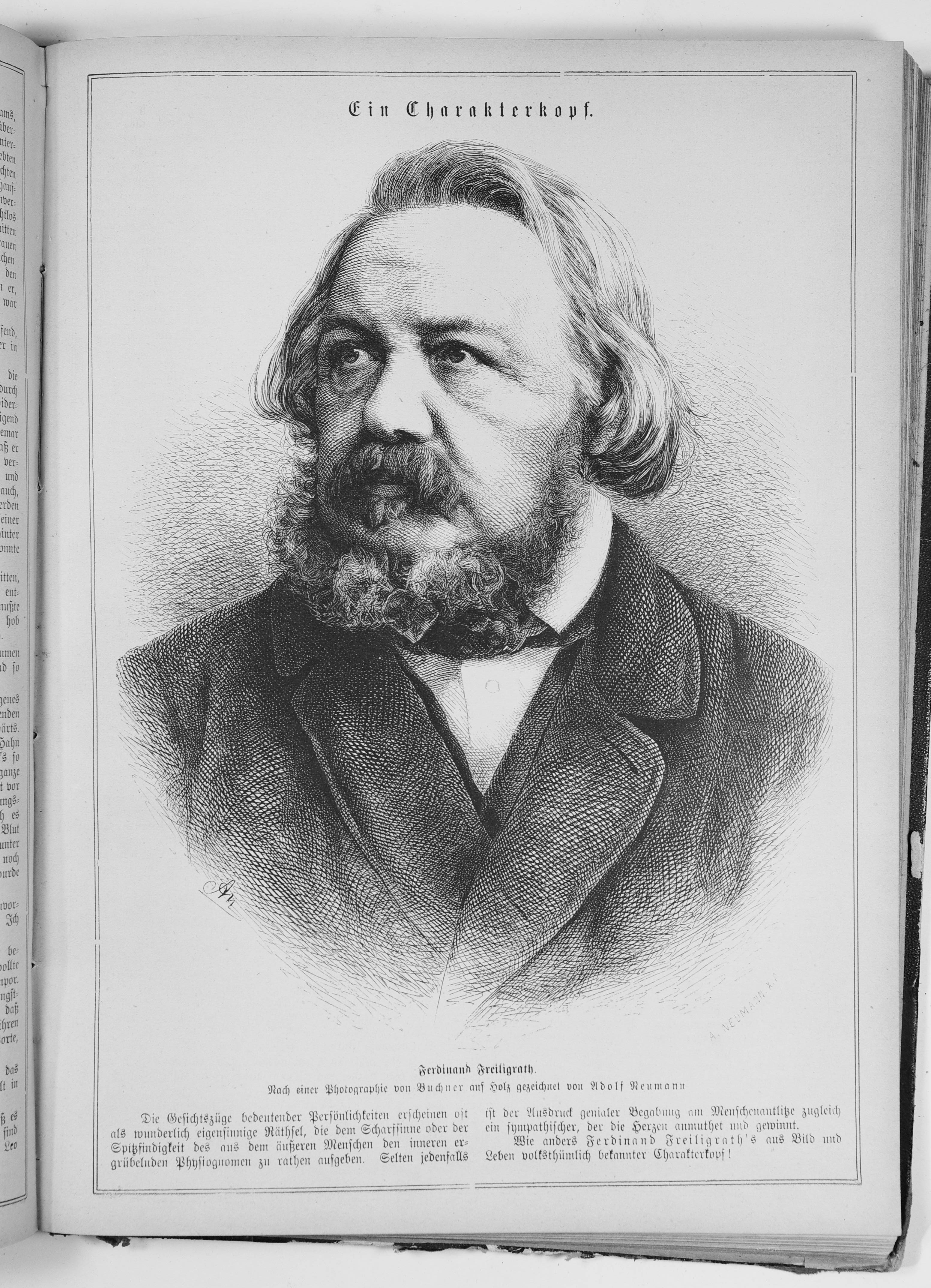 Seite 753 aus "Die Gartenlaube". Page 753 from journal Die Gartenlaube for 1876. Extracted image (if any): File:Die Gartenlaube (1876) b 753.jpg - hi res, ~2.5 MB.